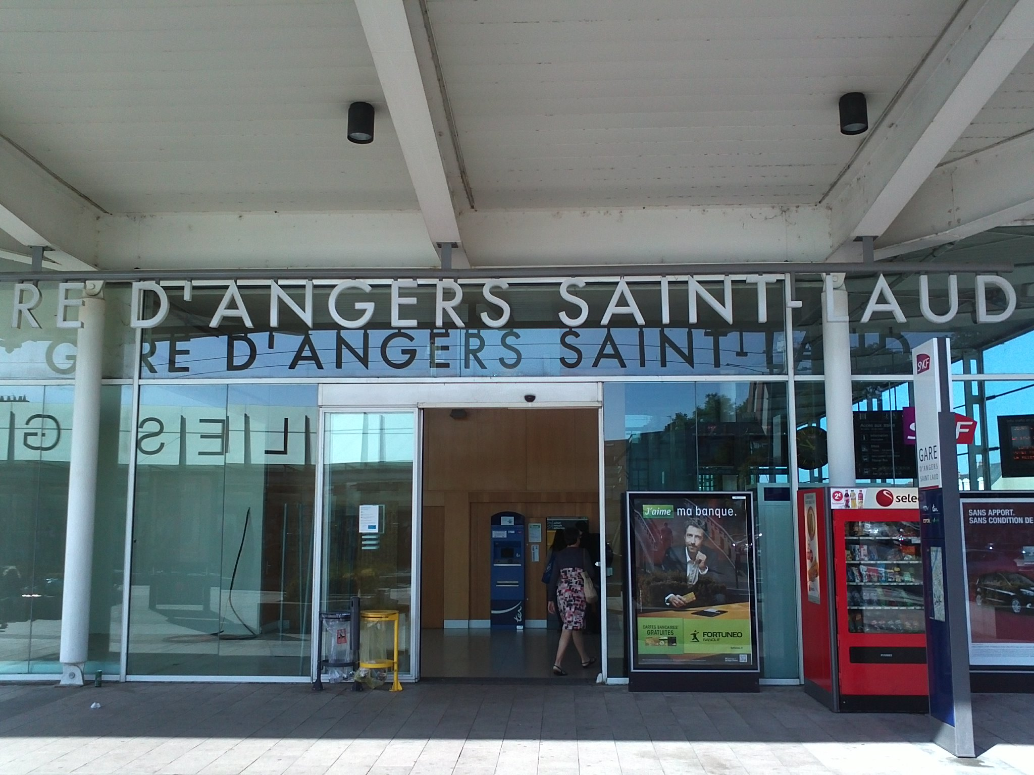 昂热圣洛站（Gare d'Angers Saint-Laud）（侧门）